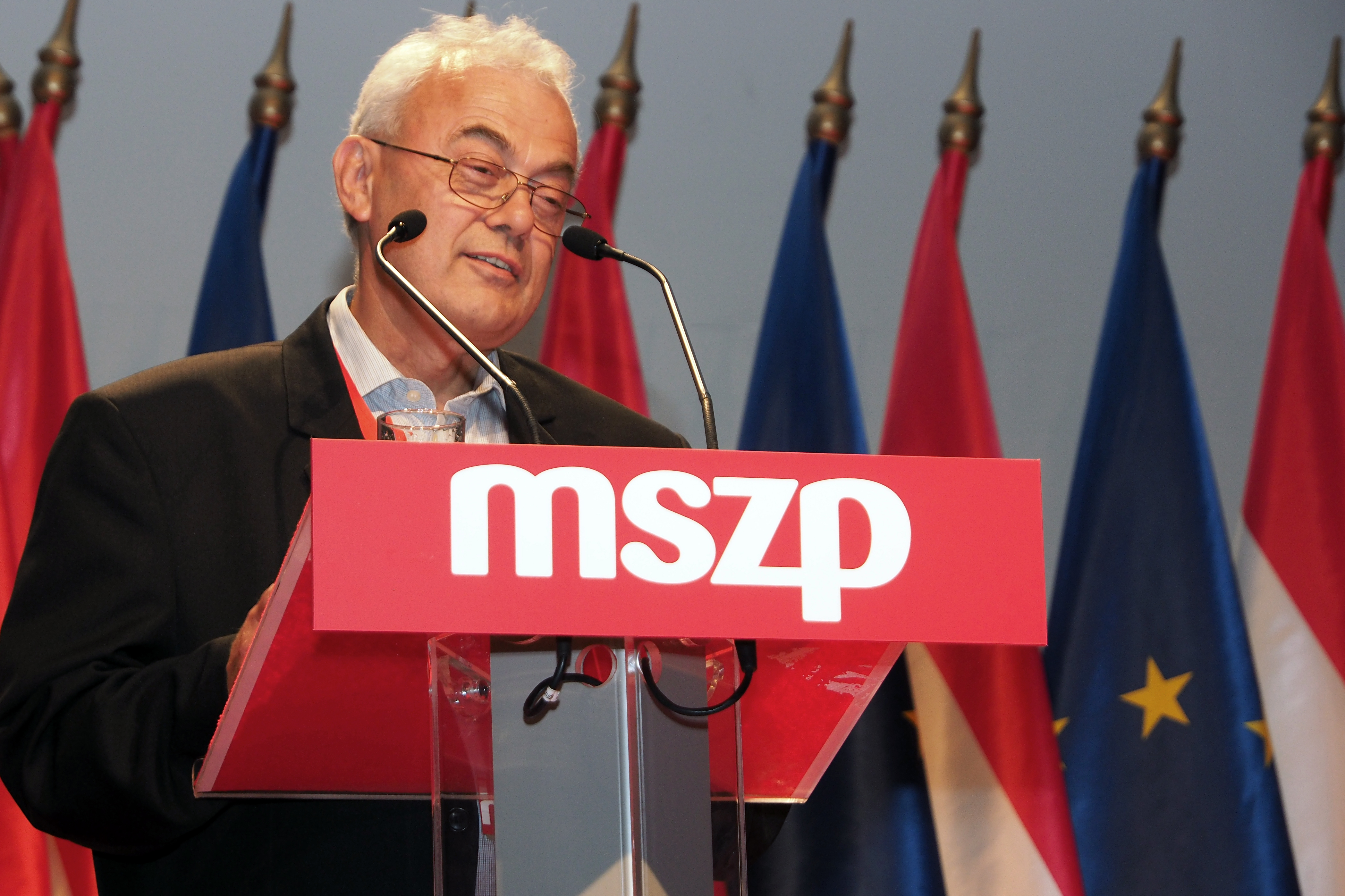 Az MSZP 2014. júliusi kongresszusa. Szabó Vilmos